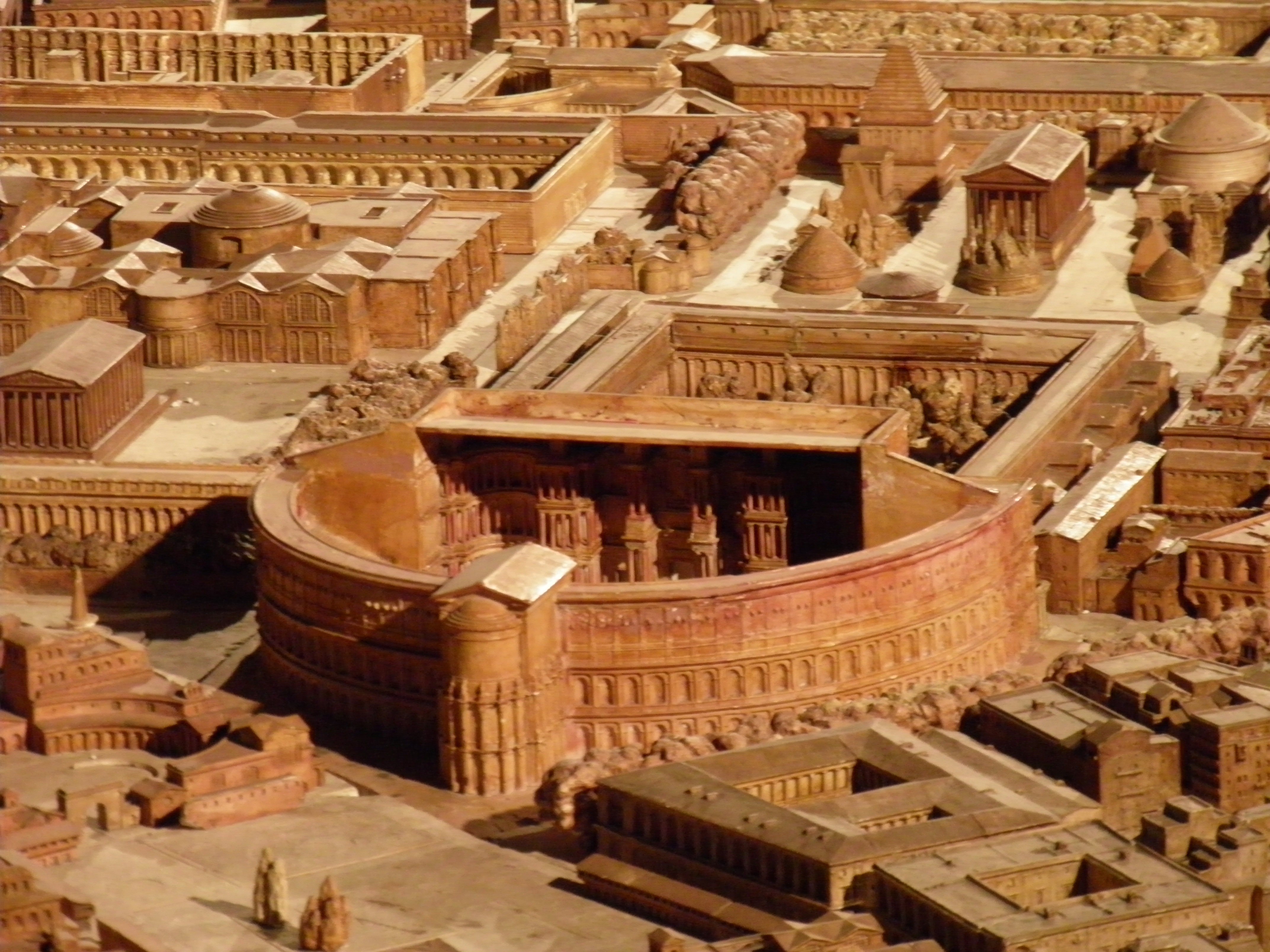 Théâtre de Pompée et area sacra du largo argentina, plan de Rome, P. Bigot, MRSH Caen